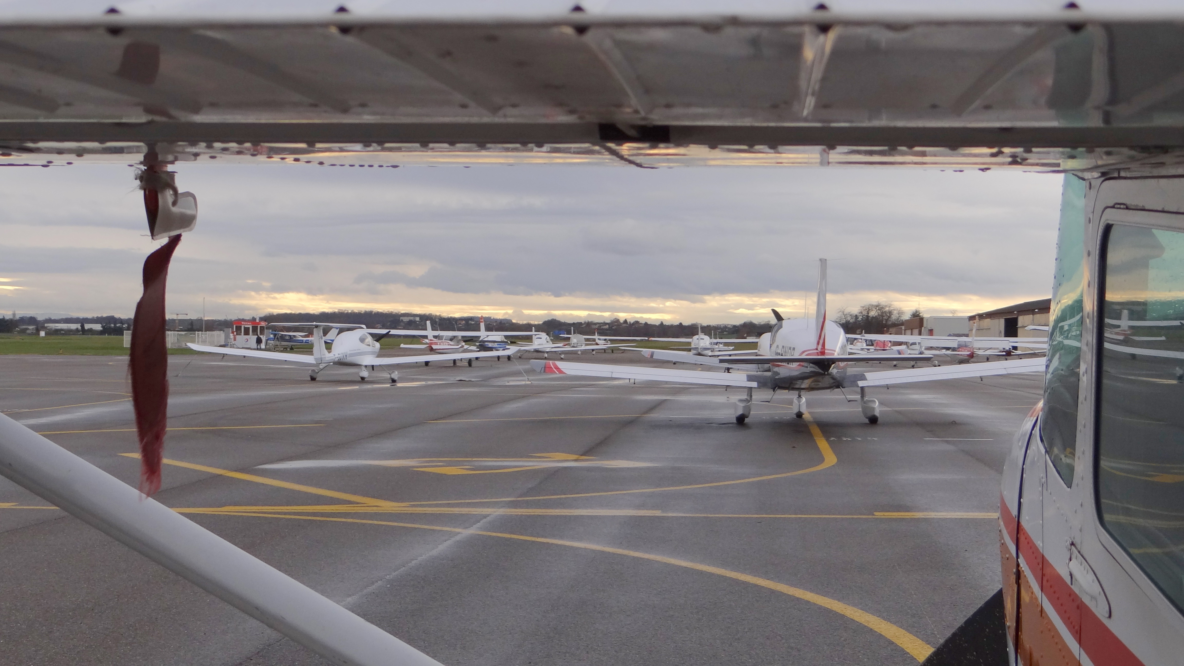 Aérodrome Lyon-Bron - parking Nord aviation légére